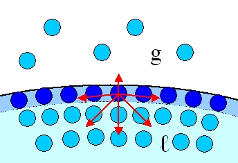 A folyadék felületi rétegében lévő részecskékre aszimmetrikus kohéziós erők hatnak